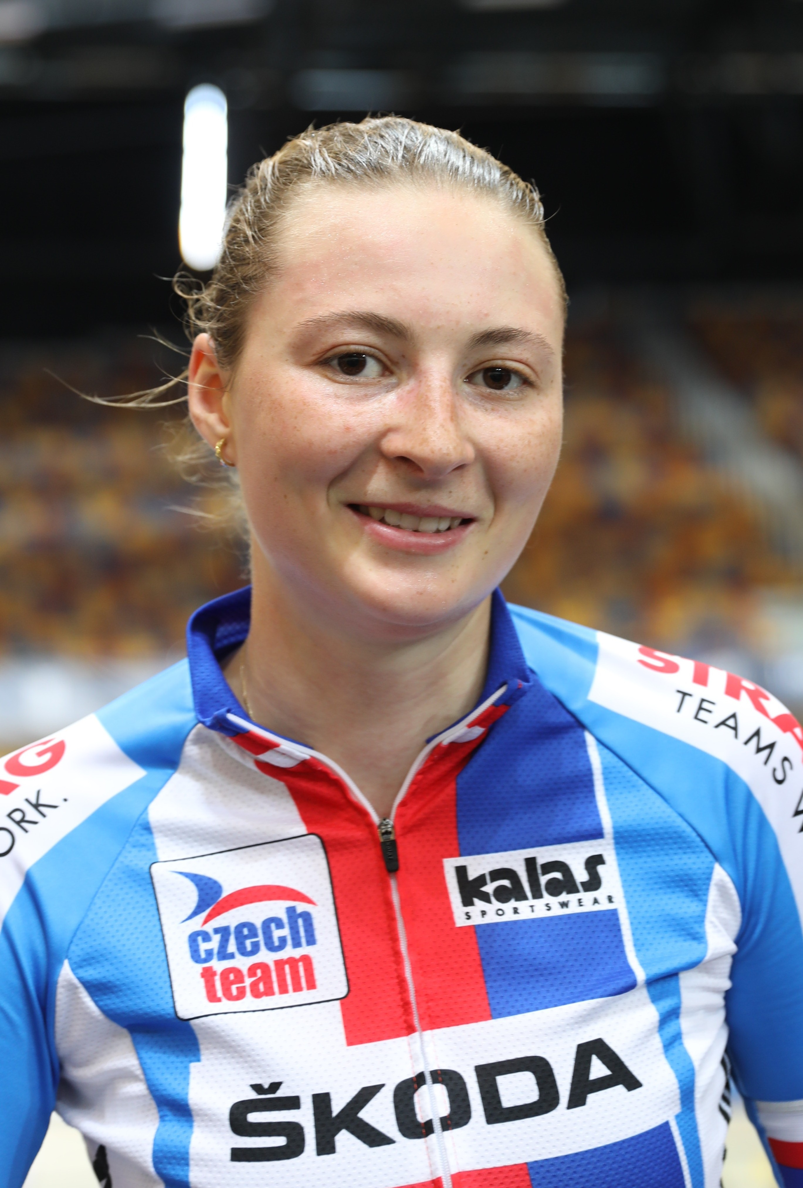 Kateřina Kohoutková, tschechische Radsportlerin